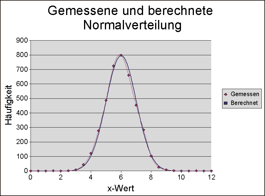 Gemessene Verteilung, die nach der sog. Zwölferregel aus Zufallszahlen erzeugt wurde, im Vergleich zur berechneten Normalverteilung. Mittelwert 6, Std=1. Urheber der Zeichnung: Anton (rp) 2005